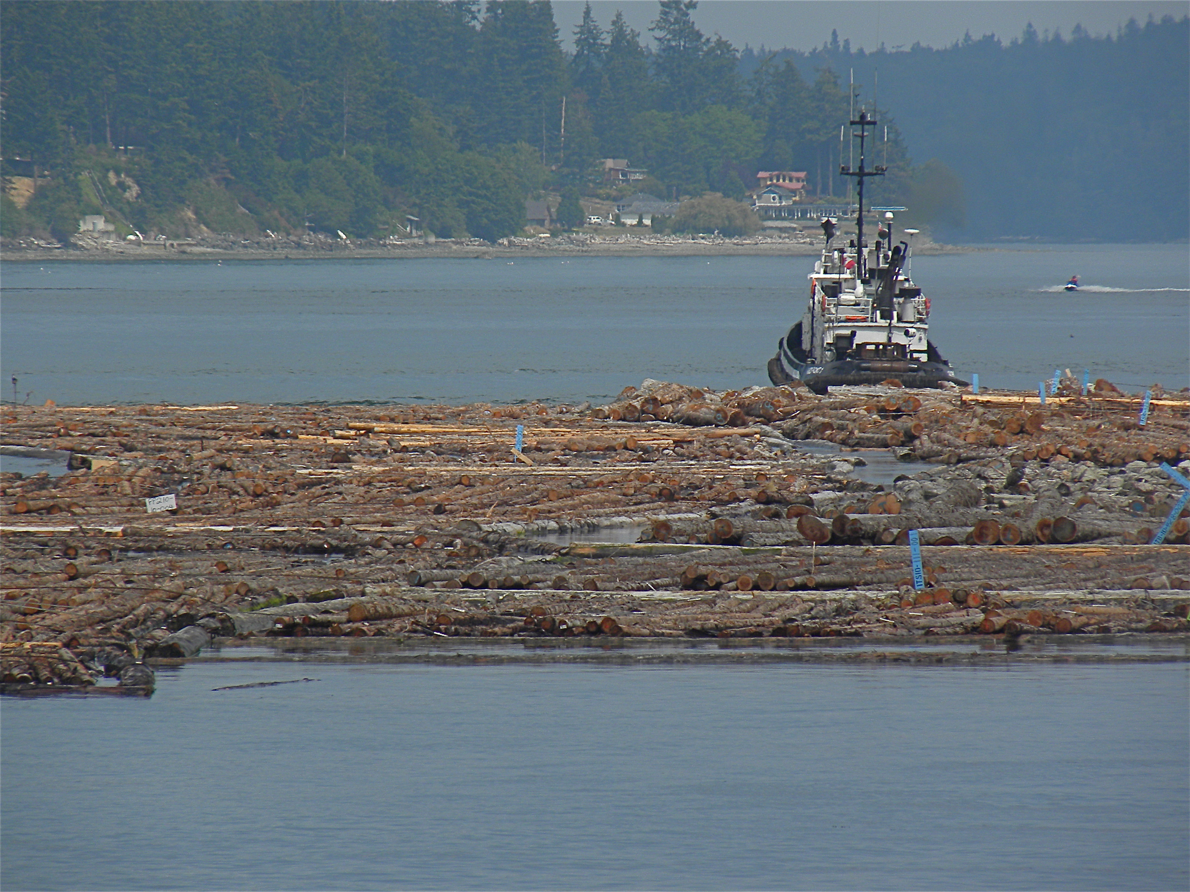 Log Boom, Skagit Bay